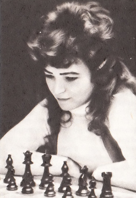 Henrijeta (Henryka) Konarkowska-Sokolov, serb. Хенријета Конарковска-Соколов (ur. 14 grudnia 1938 w Inowrocławiu) – serbska szachistka polskiego pochodzenia, mistrzyni międzynarodowa od 1962, arcymistrzyni od 1986 roku.